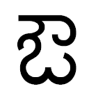 аукараву